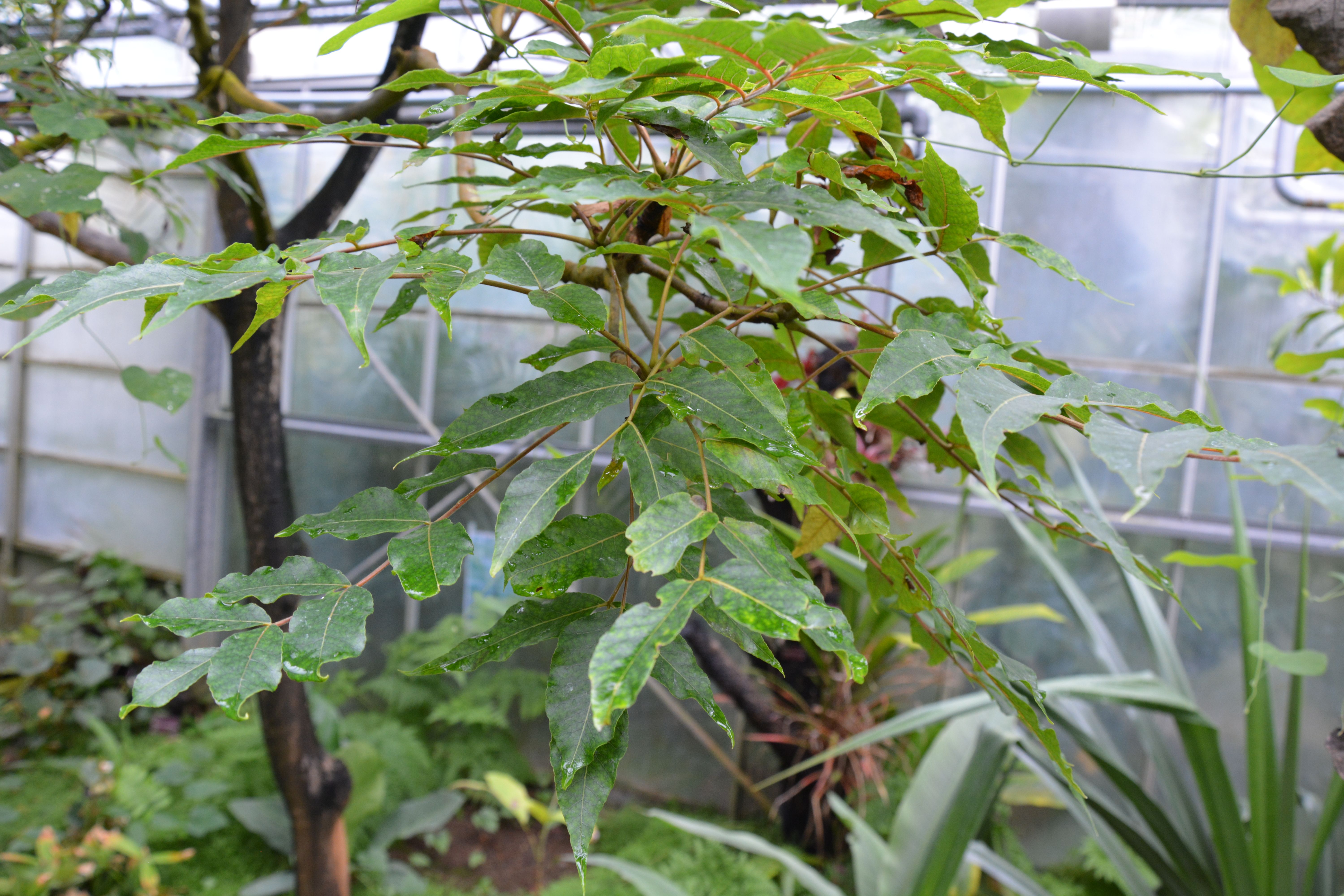 L'espèce "Poupartia castanea" dans les serres tropicales N°4 correspondant au climat forêts tropicales humides du Conservatoire Botanique National de Brest. Photo prise lors des journées contributives au Conservatoire Botanique National de Brest durant l'été 2015